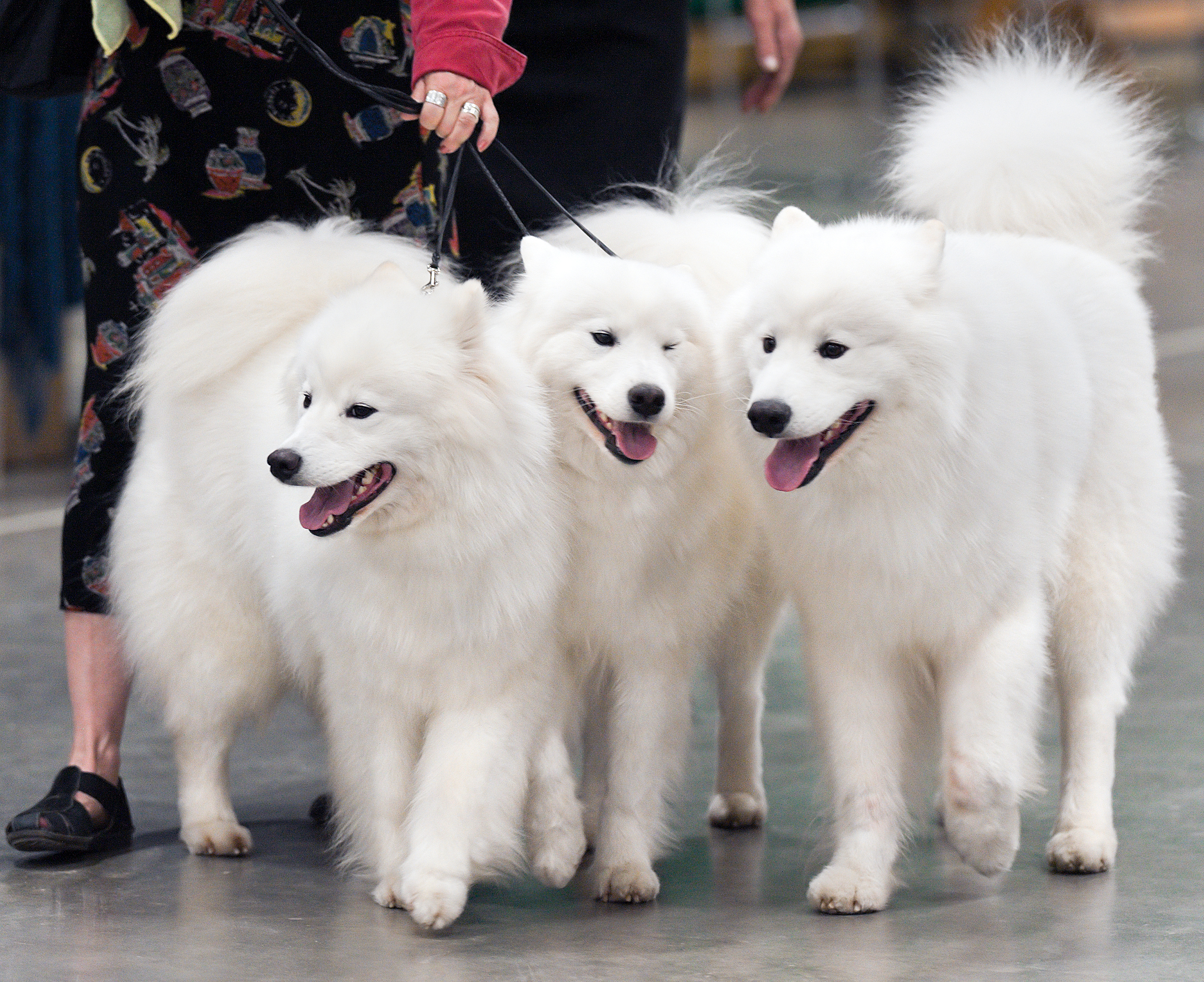 Samoiedskaïa Sabaka